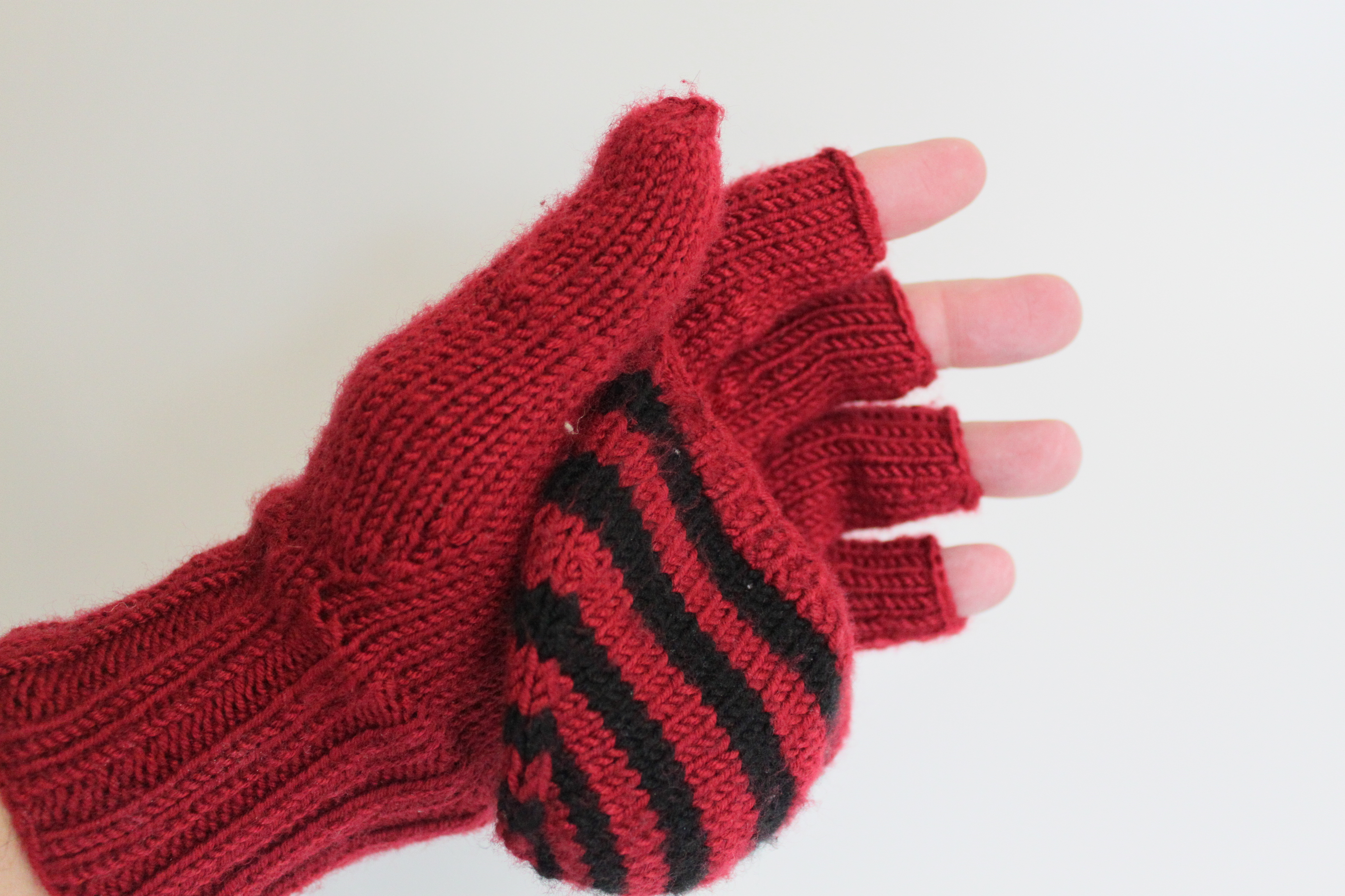 Klappfäustling (engl. fold mitten; Synonym: 2-in-1 Handschuh oder 2+1 Handschuh, selten Überstülper-Handschuh), ein Fingerhandschuh mit einem Fäustling-Überzug zum Wegklappen (z. B. Jägerhandschuhe)